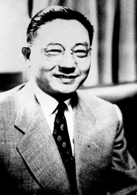 向哲濬